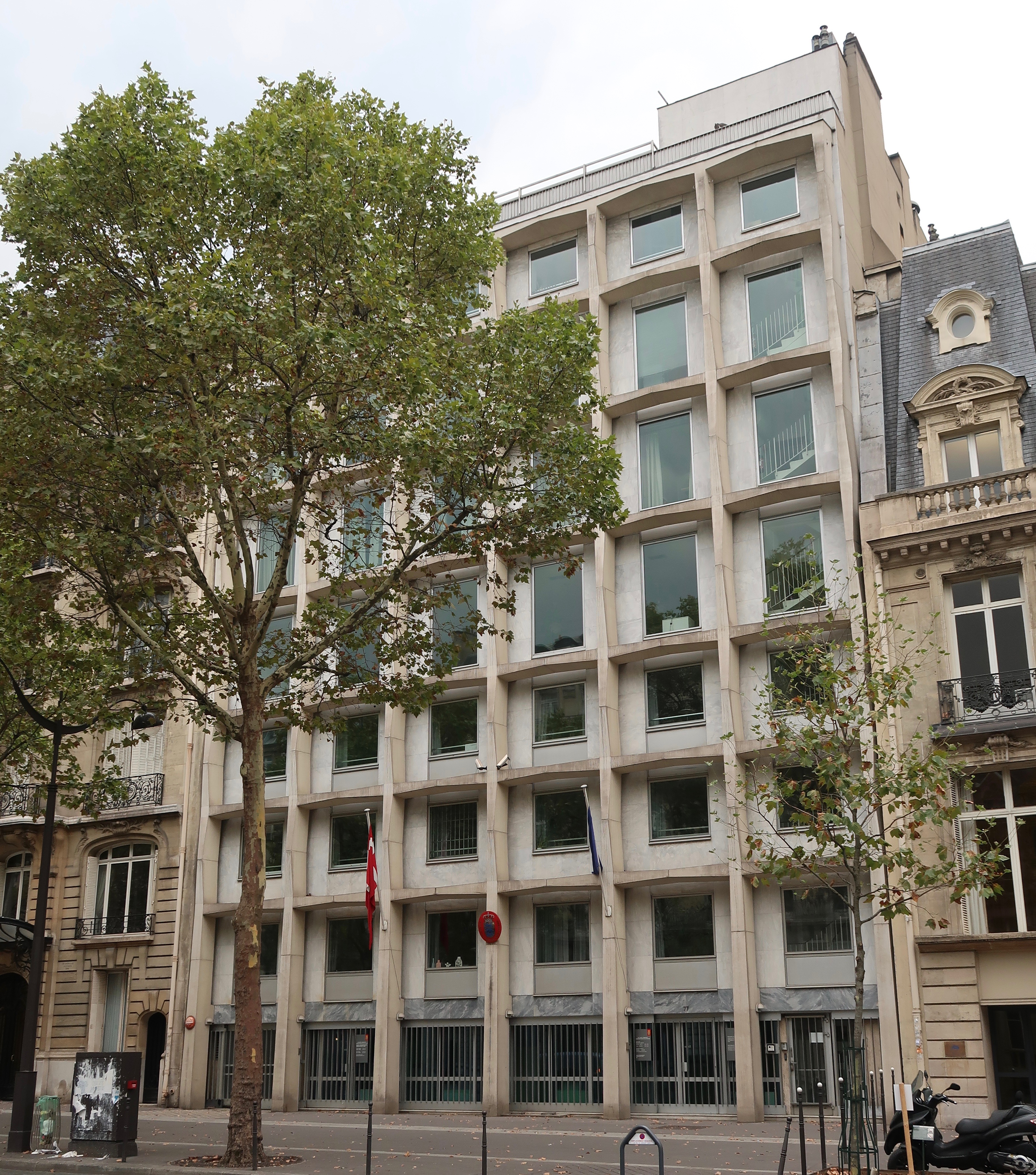 Ambassade du Danemark en France, 77 avenue Marceau (Paris 16e).